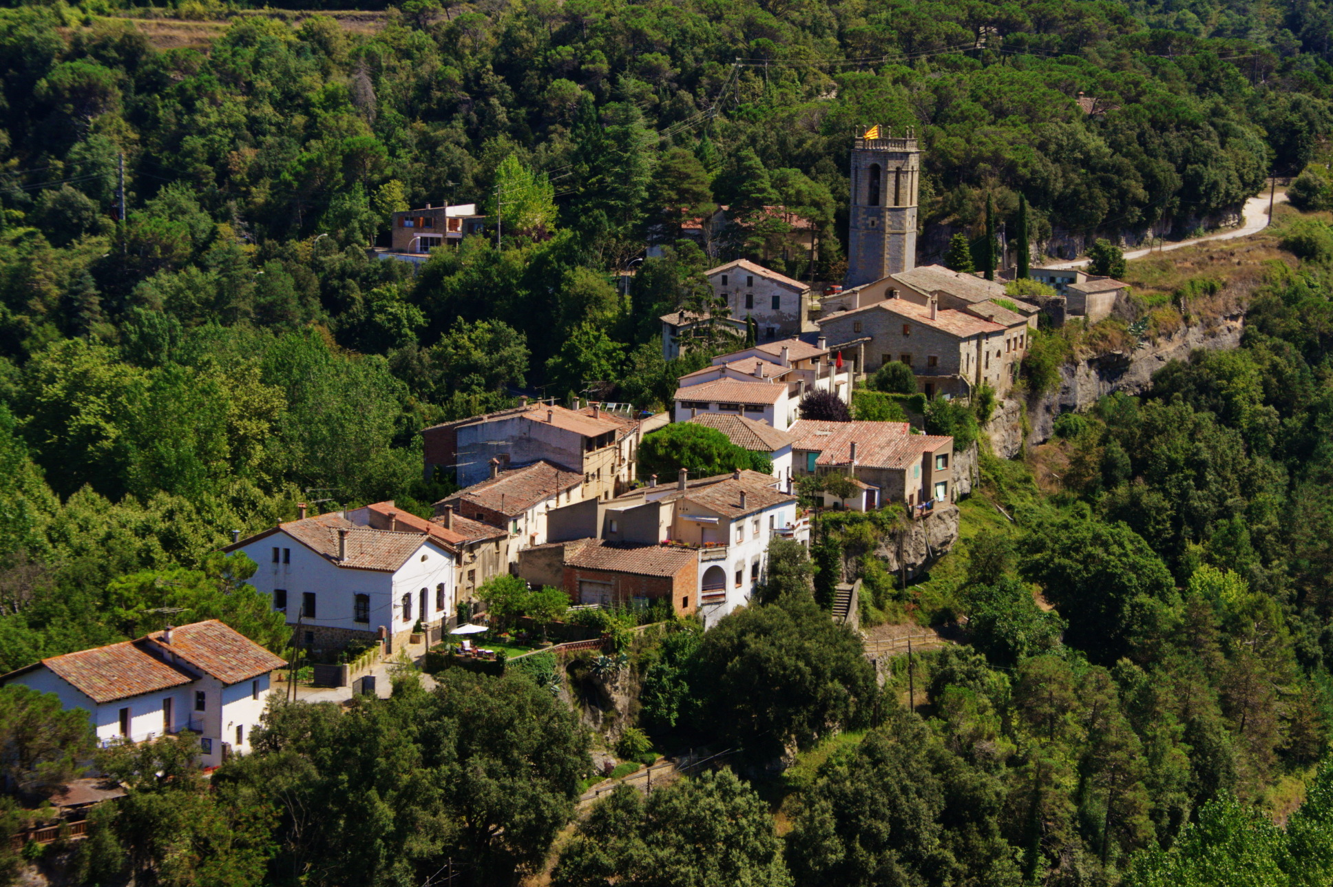 Església parroquial de Sant Quirze Safaja, amb tot el poble sobre la carena